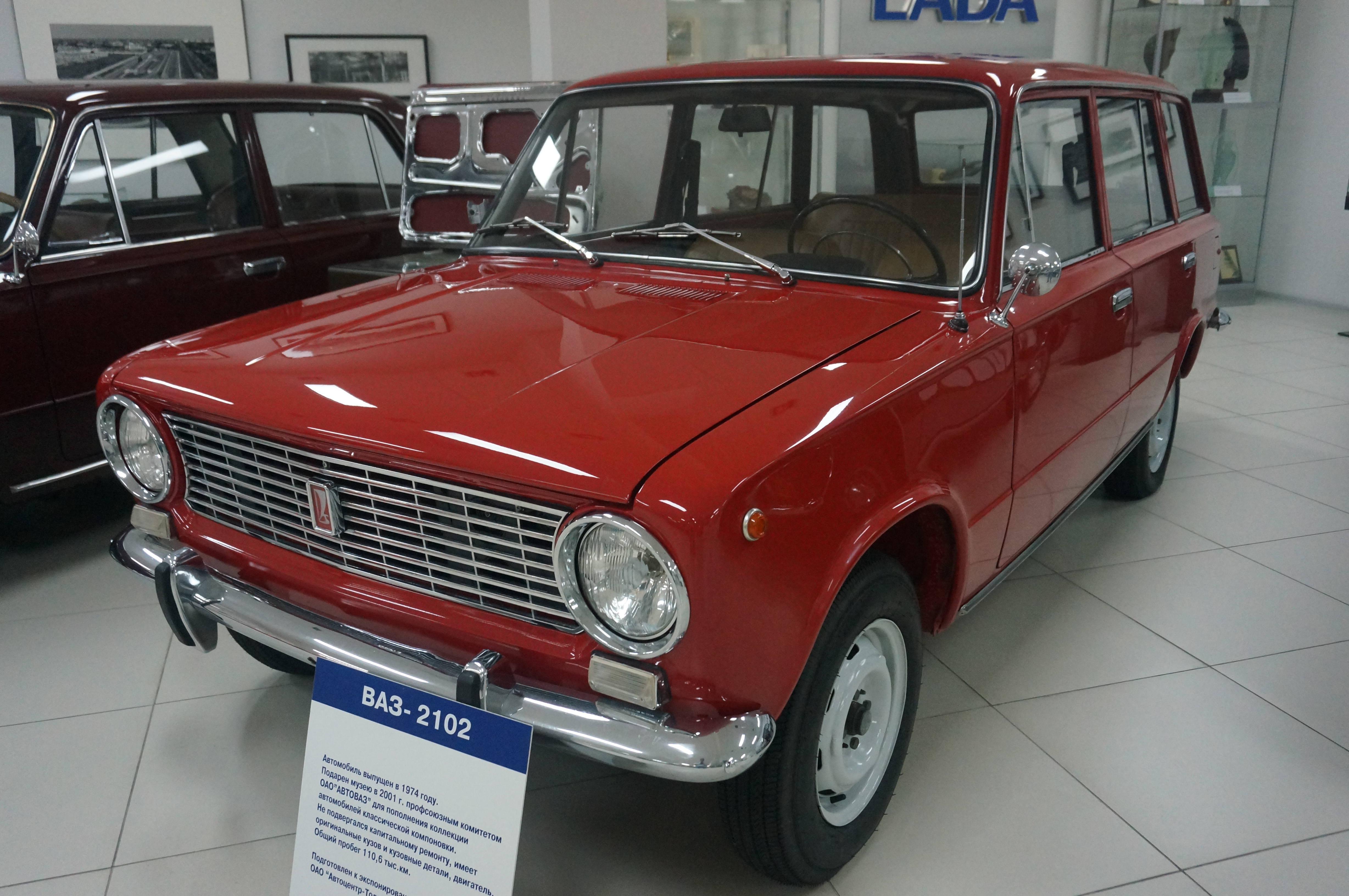 ВАЗ 2102 в музее АвтоВАЗа. Собран в 1974 году. Подарен музею профсоюзом автозавода. Не подвергался капитальному ремонту, имеет оригинальные кузов, кузовные детали, двигатель. Общий пробег 110,6 тыс. км